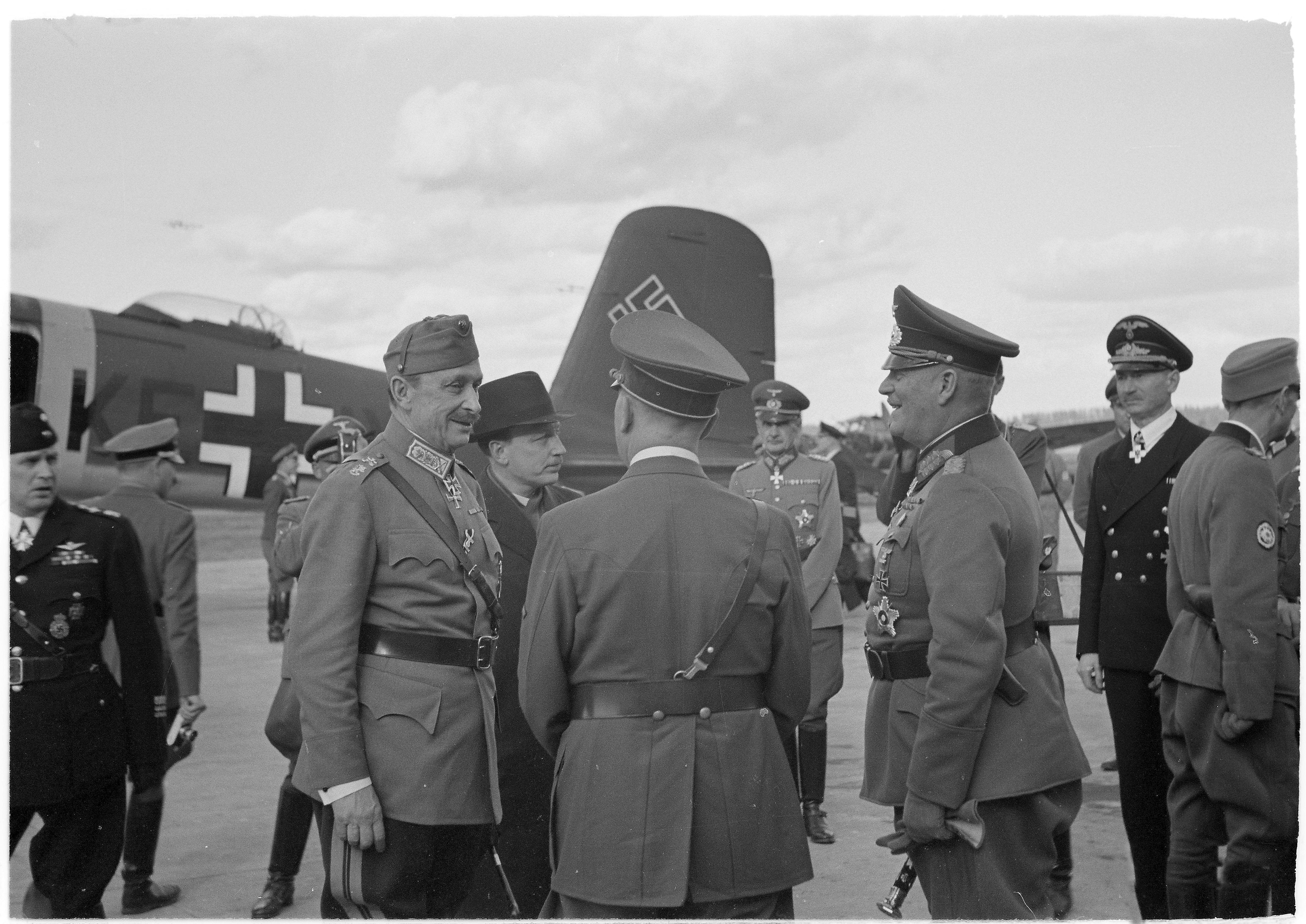 Hitlerin vierailu Suomessa. (Taustalla on Heinkel He 111 H-6. Vasemmalta: majuri Börje Söderström (näkyy osaksi), marsalkka Mannerheim, presidentti Ryti, Saksan valtakunnan kansleri Adolf Hitler (selin), Hitlerin oikean olkapään kohdalla taempana jalkaväenkenraali Waldemar Erfurth, sotamarsalkka Wilhelm Keitel, Saksan Suomen lähettiläs Wipert von Blücher ja oikealla selin kenraalieversti Eduard Dietl. Kuvauspaikka: Immolan lentokenttä